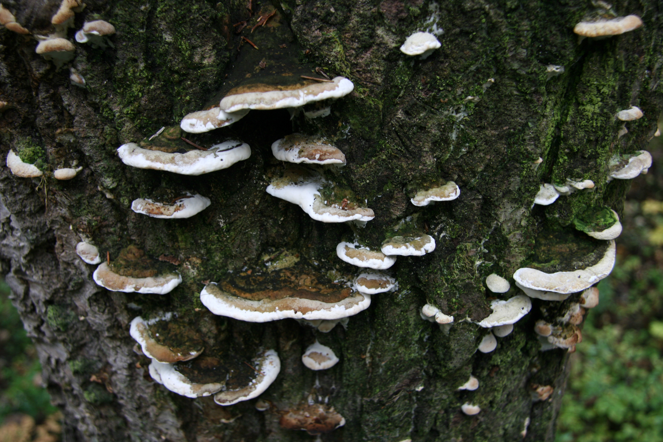 Lönnticka